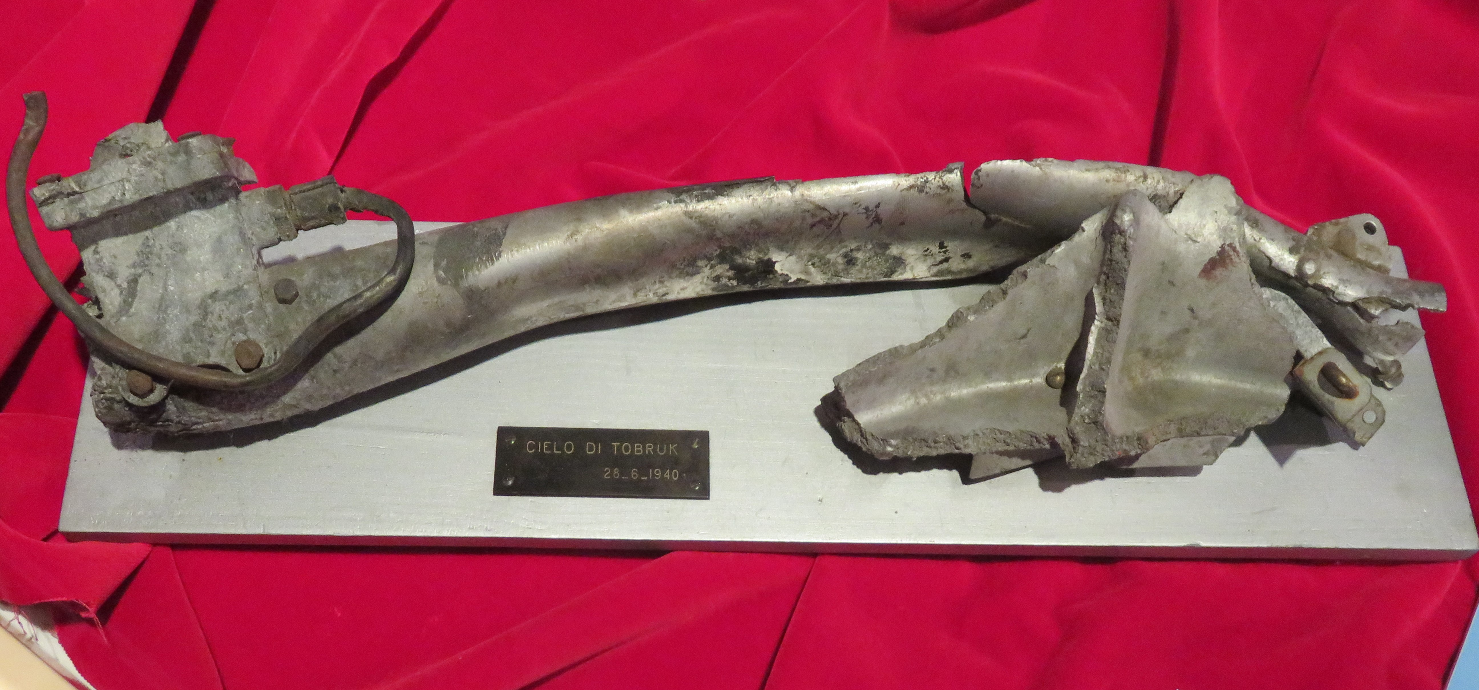 Cimelio storico esposto alla mostra itinerante Mari e cieli di Balbo. Museo Caproni Mattarello